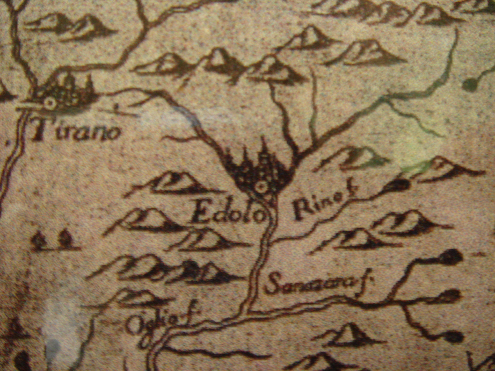 Riproduzione di una mappa del 1642 dell'alta Valle Camonica in provincia di Brescia. Sono visibili di comuni di Tirano, Edolo, Rino di Sonico e il fiume Oglio